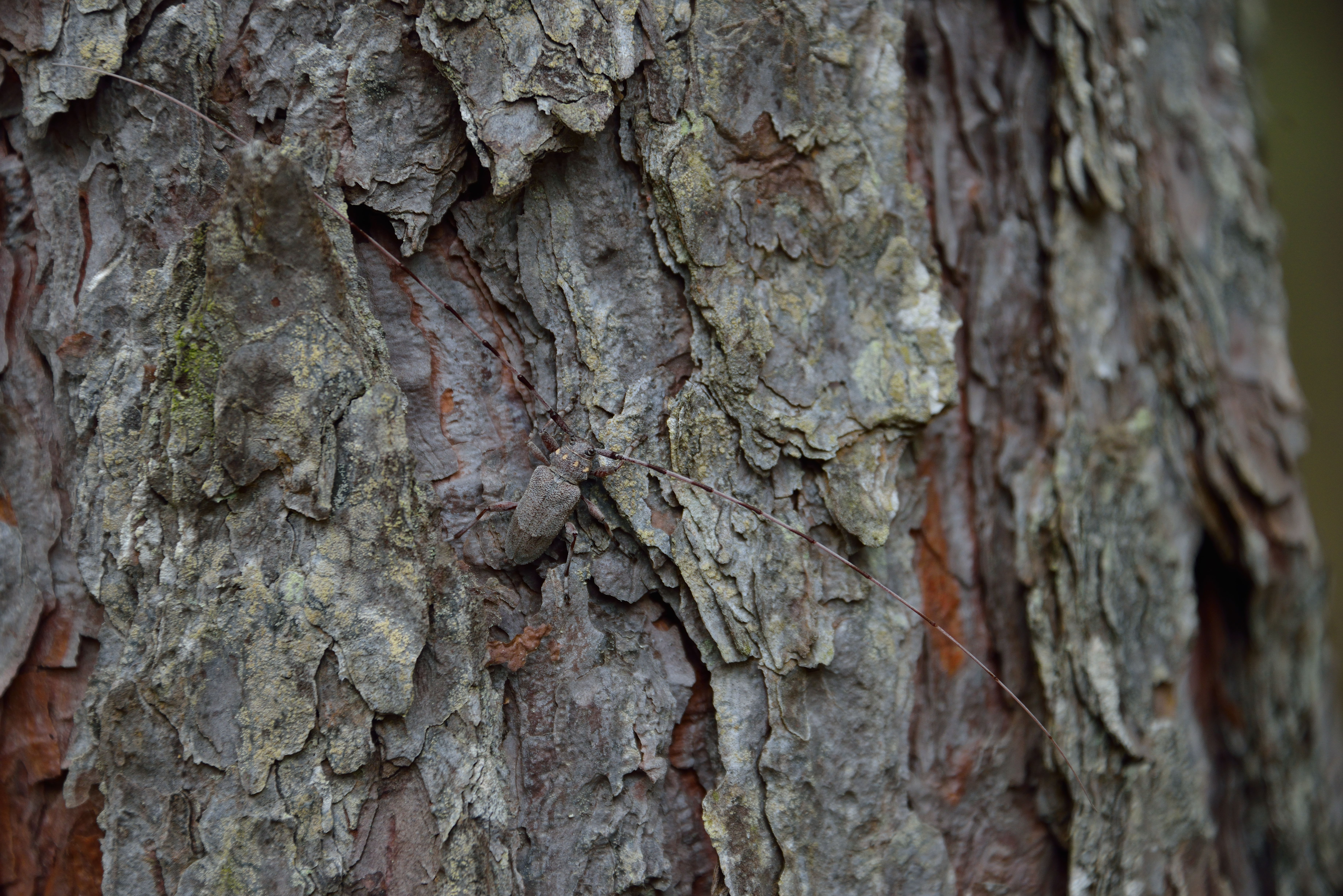 Harilik käätsusikk (Acanthocinus aedilis) männil